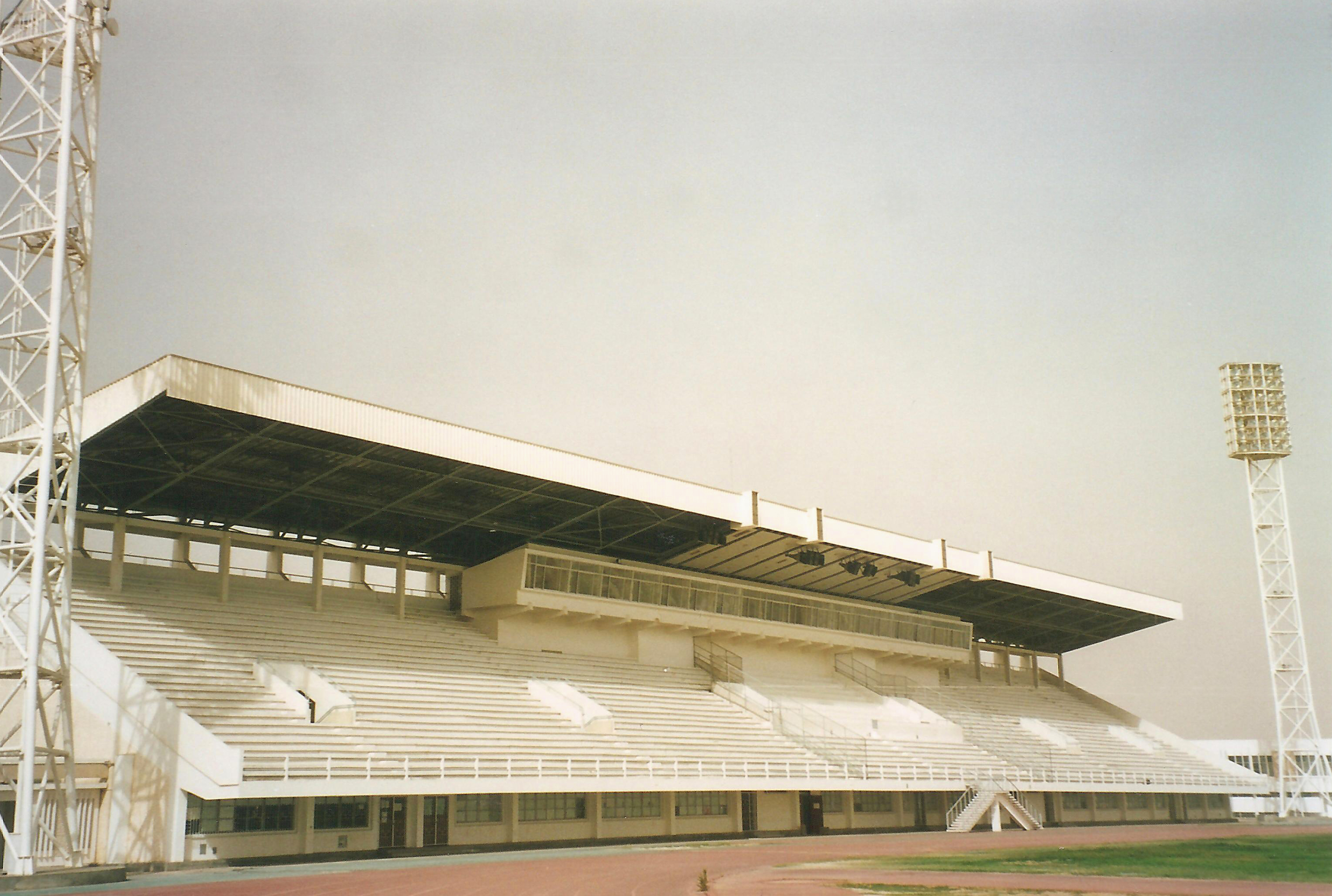 Mauretanien: Nationalstadion in Nouakchott